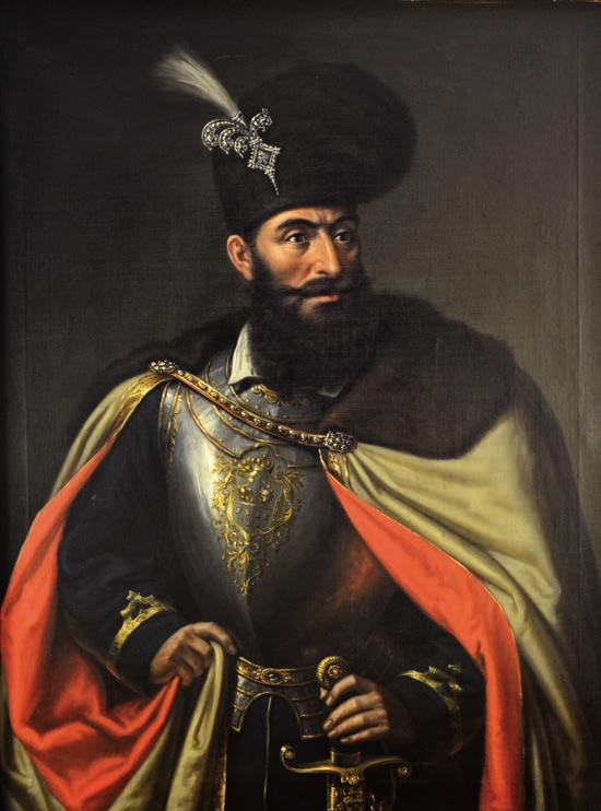 Mihai Viteazul, Ulei pe pânză, 100 x 75 cm, Nesemnat, Nr. inv. 71, Muzeul de Artă din Brașov